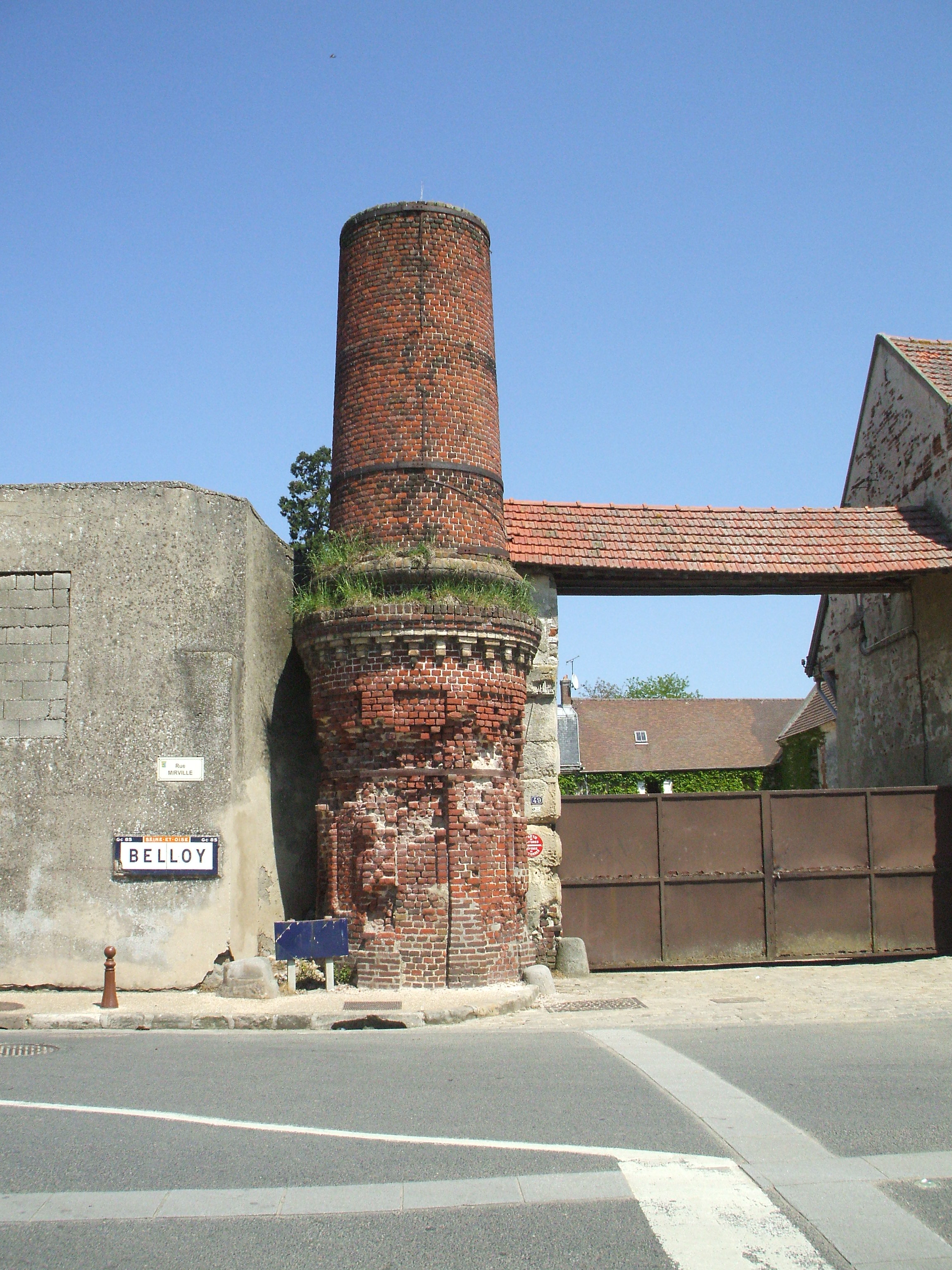 cheminée de la Distillerie de belloy en france val d'oise